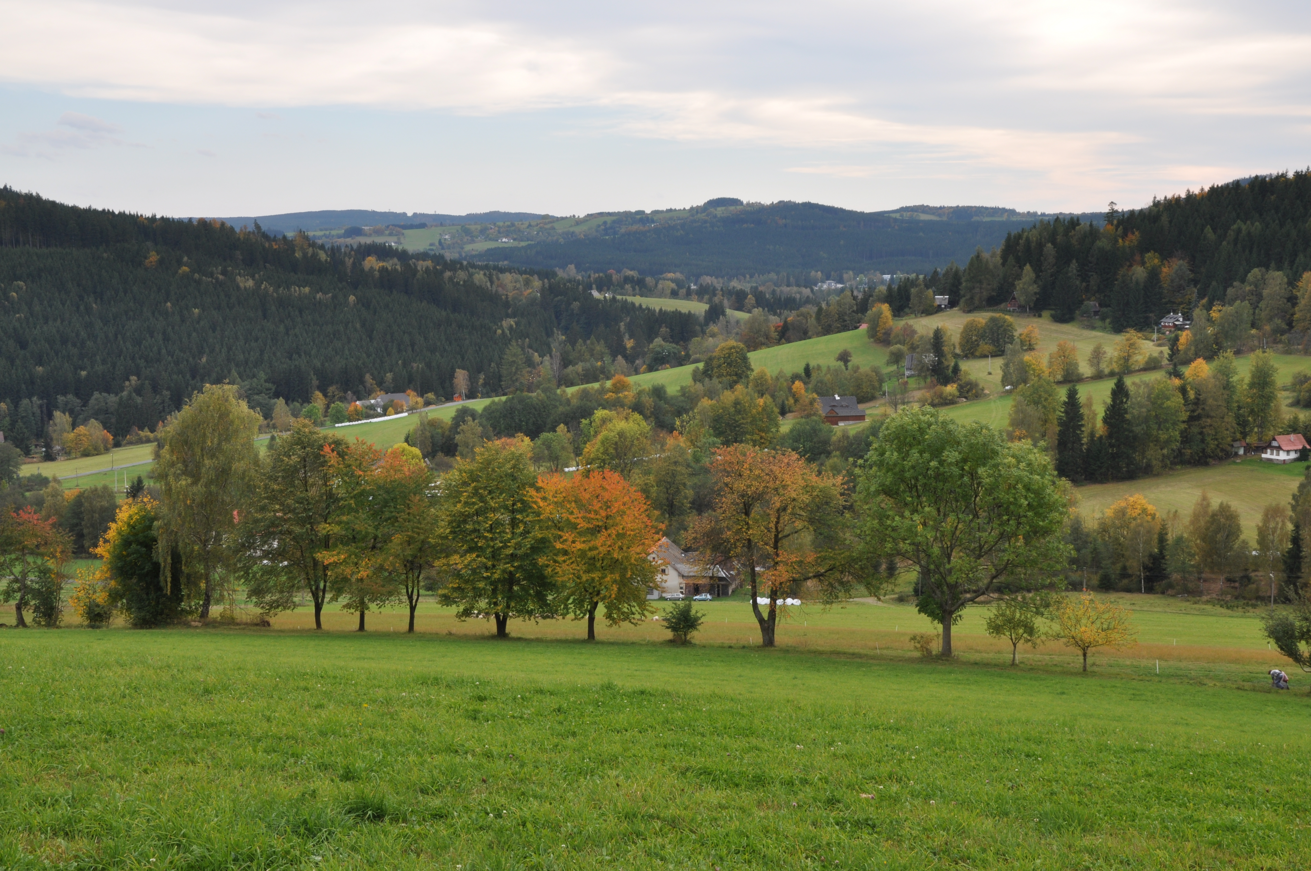 Výhled cestou z Rybenských perničků na Březiny, nad Březinami.